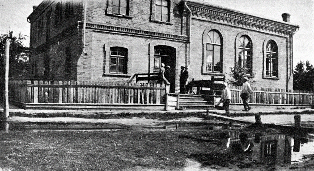 Беларуская (тарашкевіца): Давыд-Гарадок (Davyd-Haradok). Столінская сынагога (Stolinskaja synagoga)